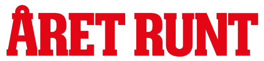 Logotyp för Året Runt.